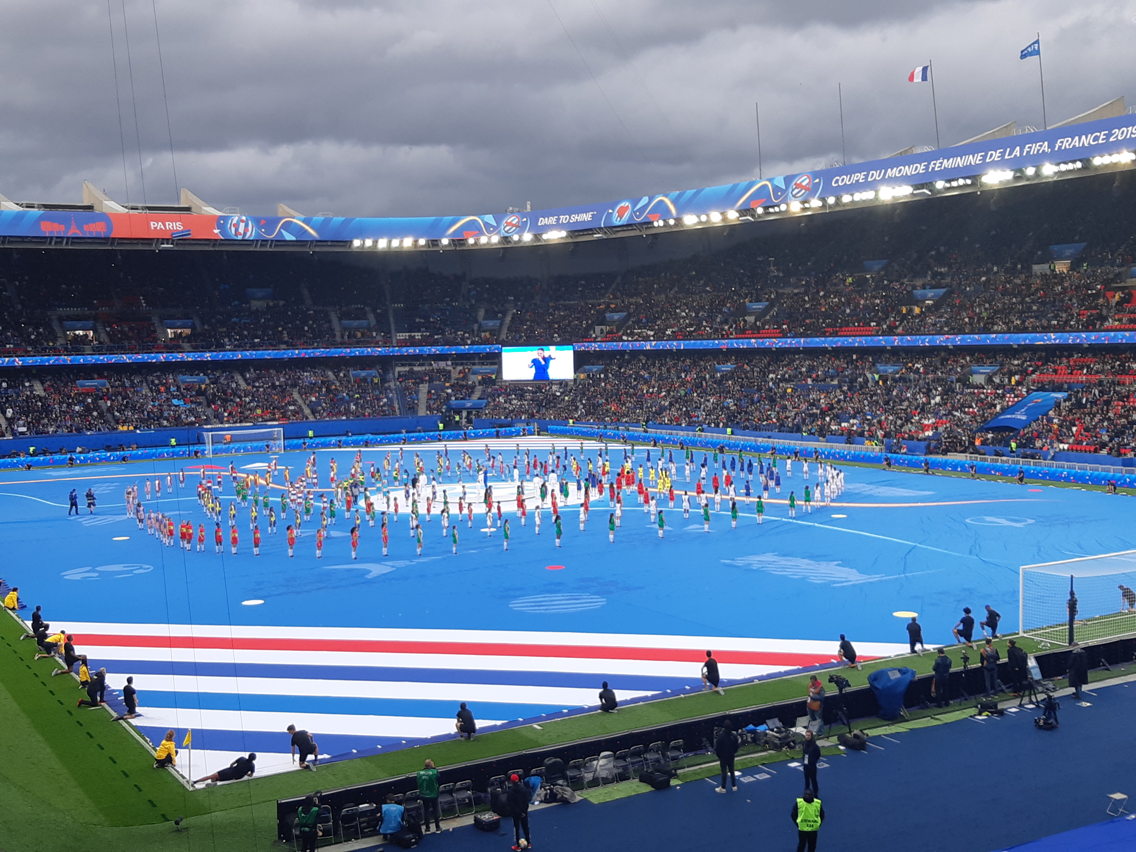 Performeuses au Parc des Princes pour la cérémonie d'ouverture, le 6 juin 2019 entre 20h30 et 21h.